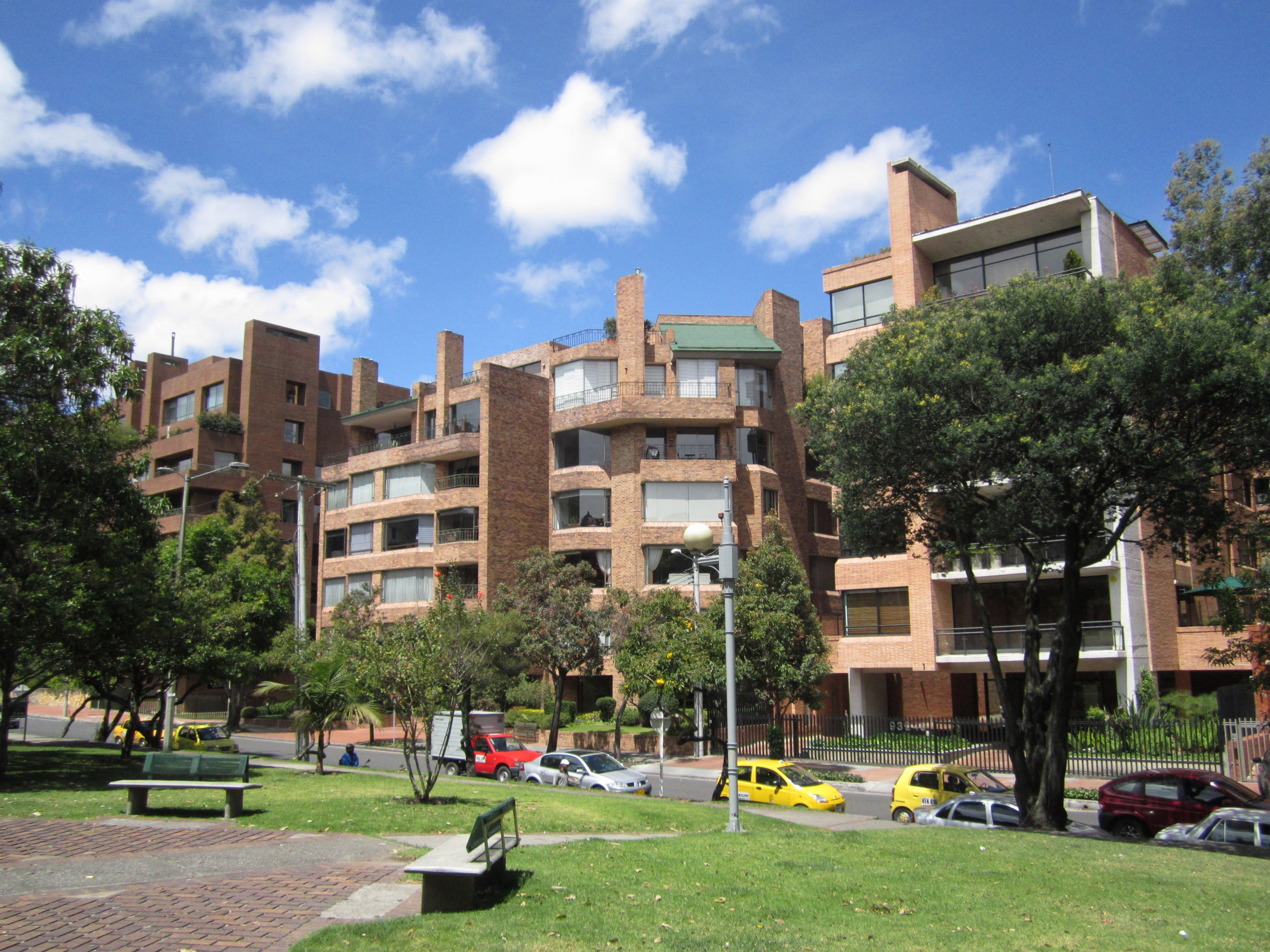 Bogotá barrio Chicó carrera 8 entre calles 93 y 94